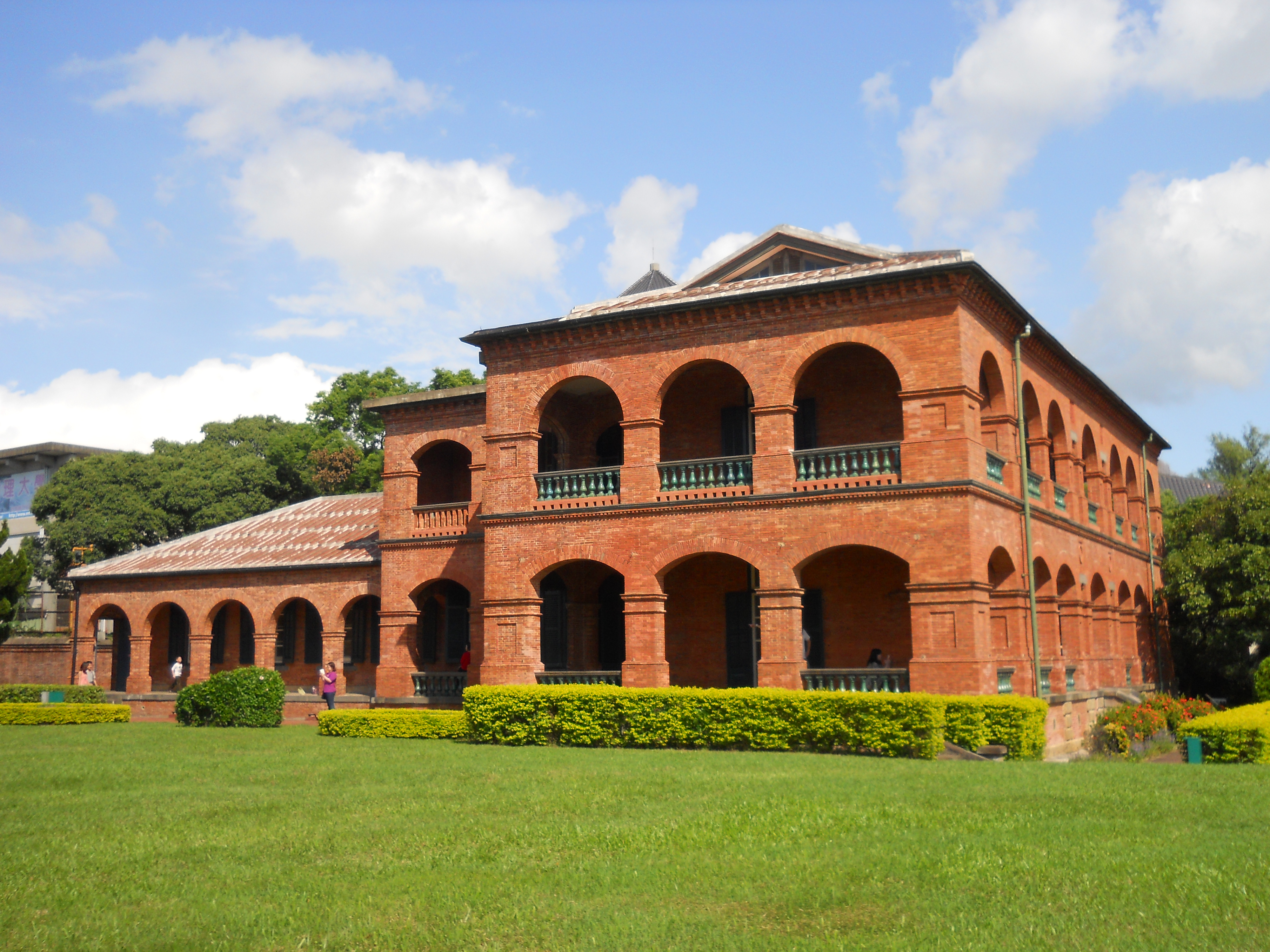 淡水紅毛城